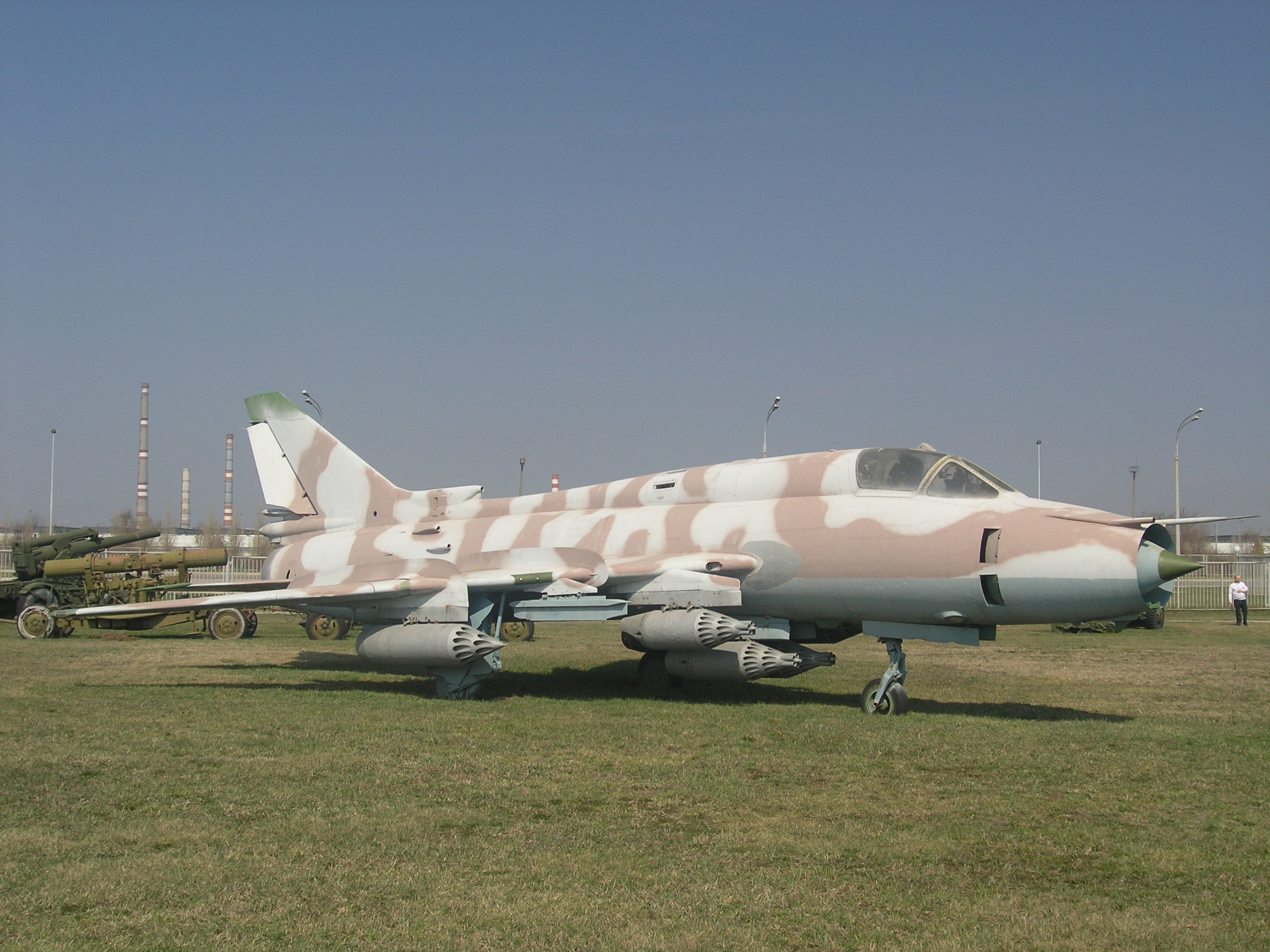 Су-17М4 в Техническом музее Тольятти